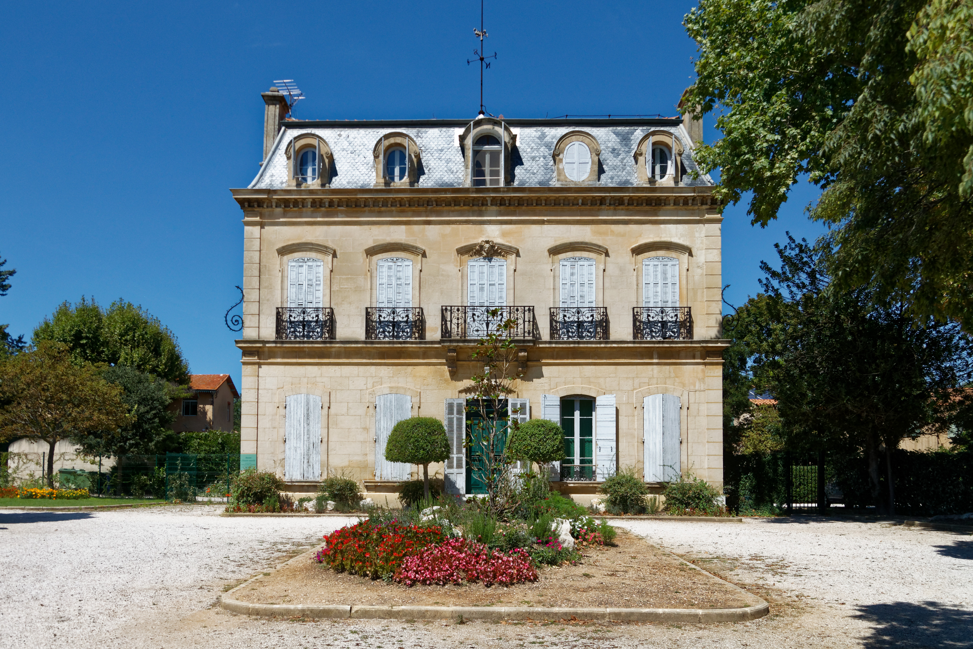 Gebäude im Parc Saint-Mitre in Aix-en-Provence, geplanter neuer Sitz des Muséum d'histoire naturelle